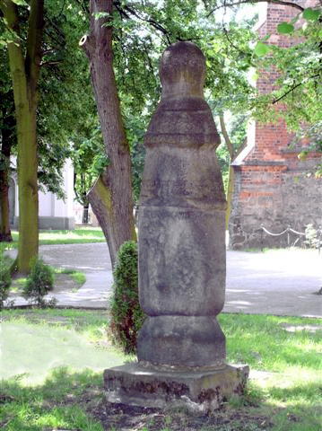 Słup milowy - najstarszy znak drogowy w Polsce. autor: Bartosz Nowak